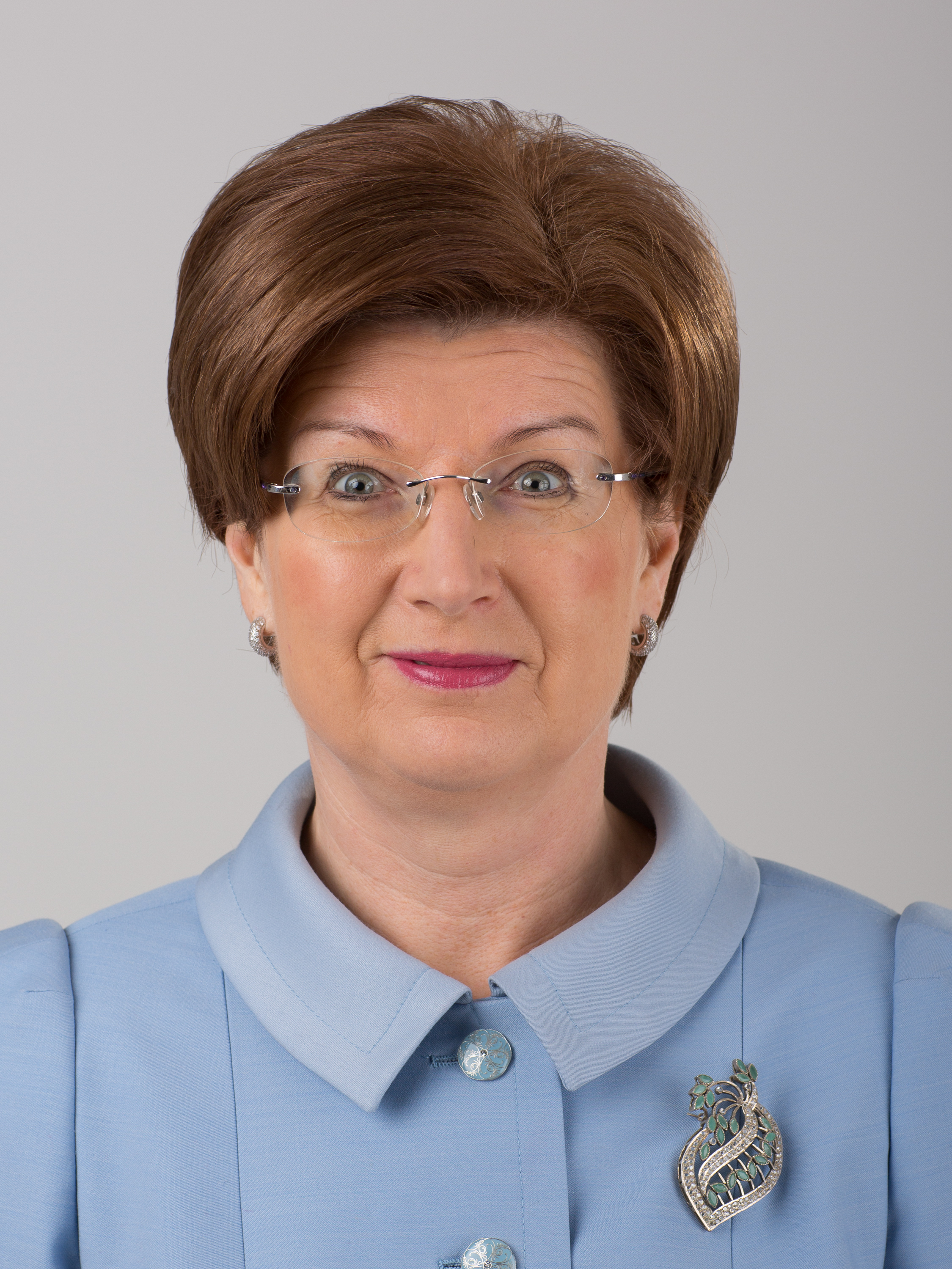 2014.gada 12.decembris. 12.Saeimas deputāte Ingūna Sudraba. Foto: Ernests Dinka, Saeimas Kanceleja Izmantošanas noteikumi: saeima.lv/lv/autortiesibas